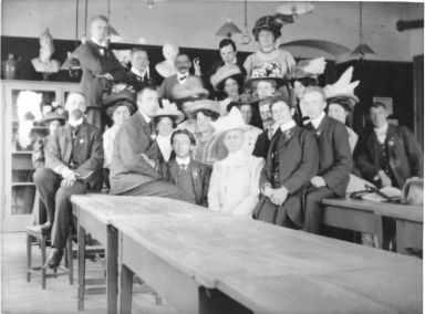 4. Esperanto-Weltkongress, Dresden 1908. Gruppenfoto der dänischen Teilnehmer.